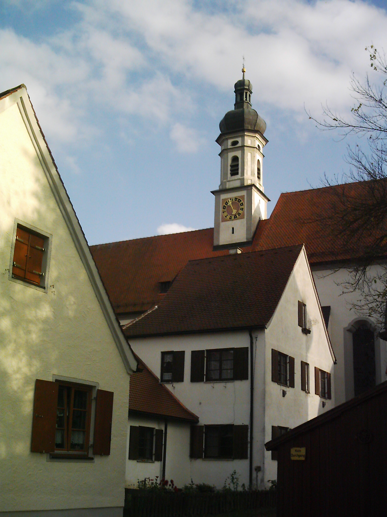 Kartause von Aussen